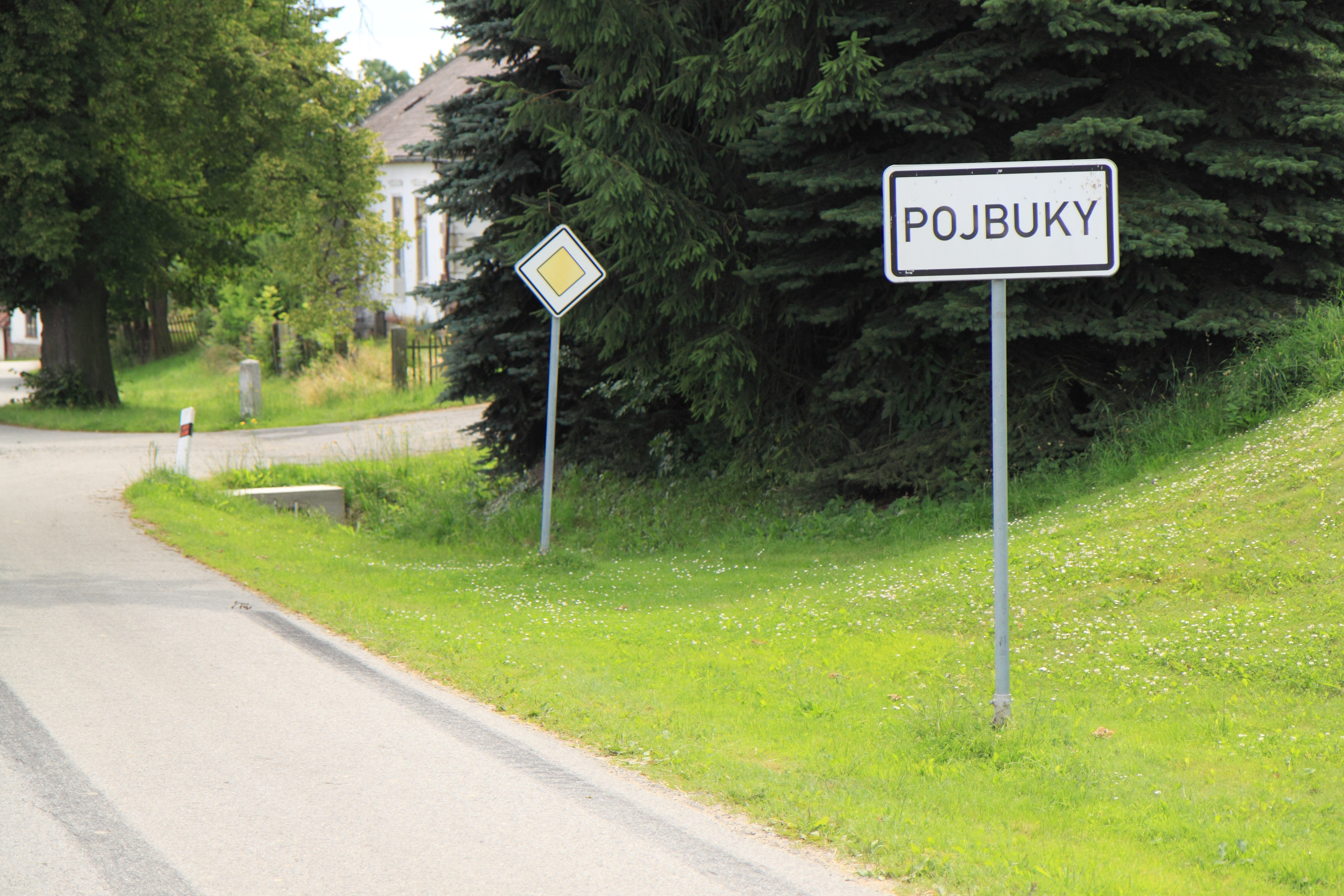 Značka na severním okraji vsi Pojbuky